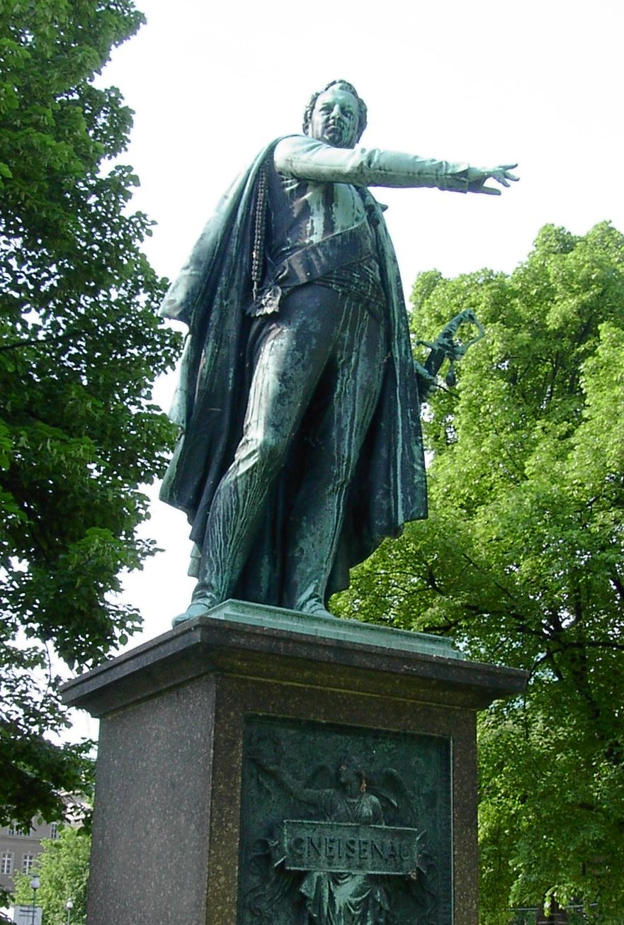 Gneisenau Statue in Berlin by Christian Daniel Rauch